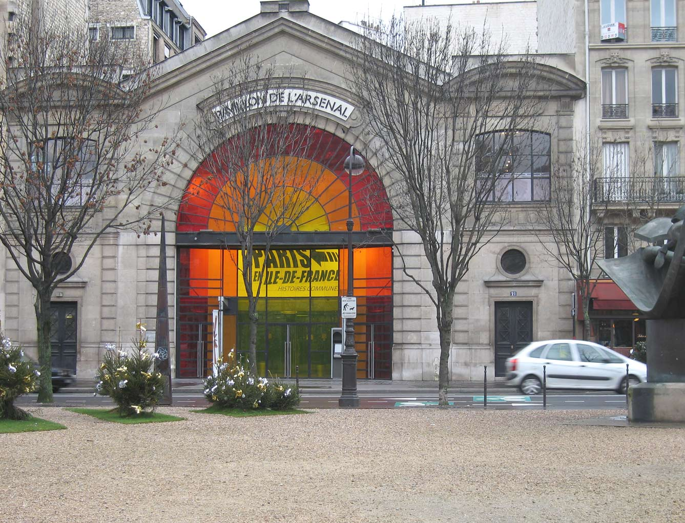 Pavillon de l'Arsenal, Paris, Centre d'exposition d'urbanisme et d'architecture de Paris, vue depuis la place du Père-Teilhard-de-Chardin